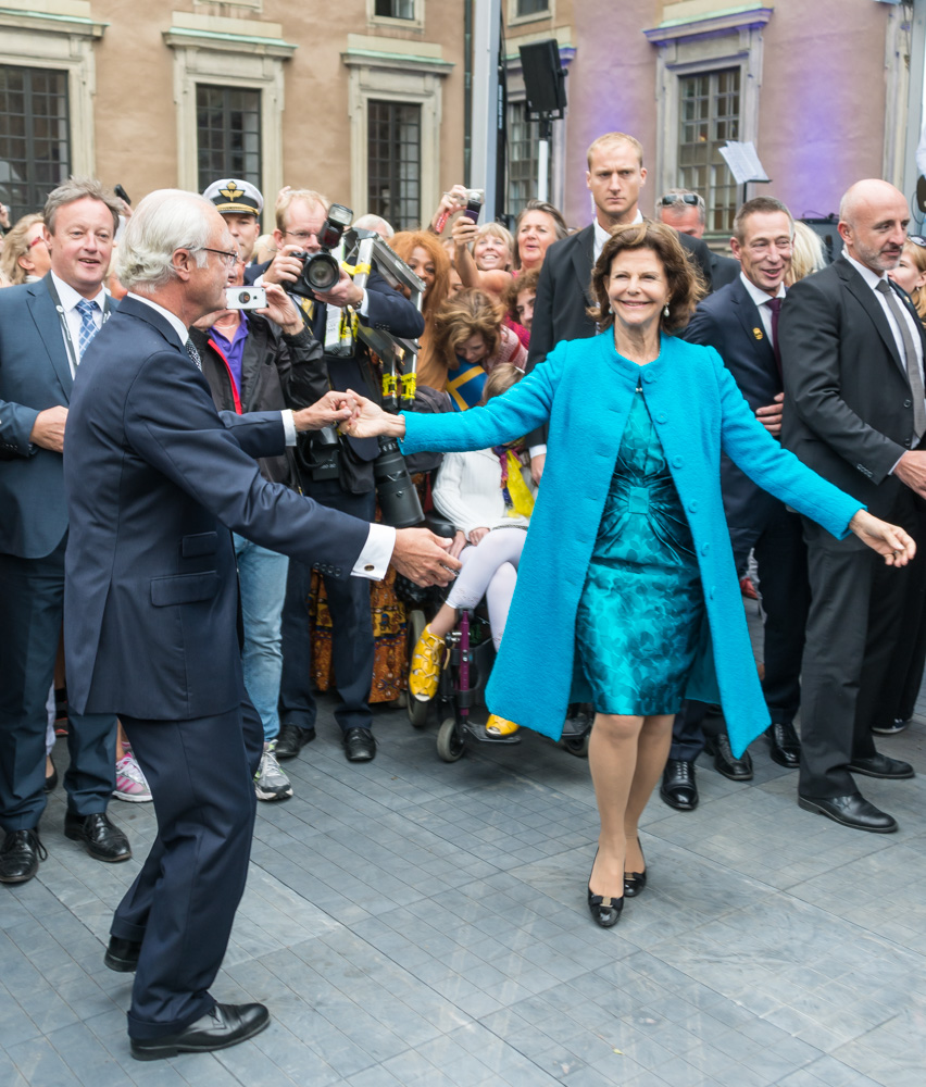 Drottning Silvia firar Carl XVI Gustafs 40 år på tronen på inre borggården på Stockholms slott den 15 september 2013.